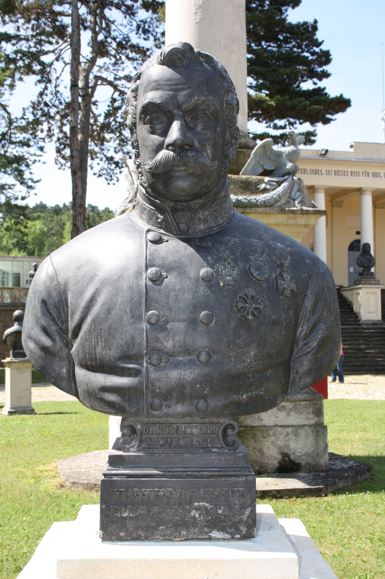 Büste in der Gedenkstätte Heldenberg (Niederösterreich)